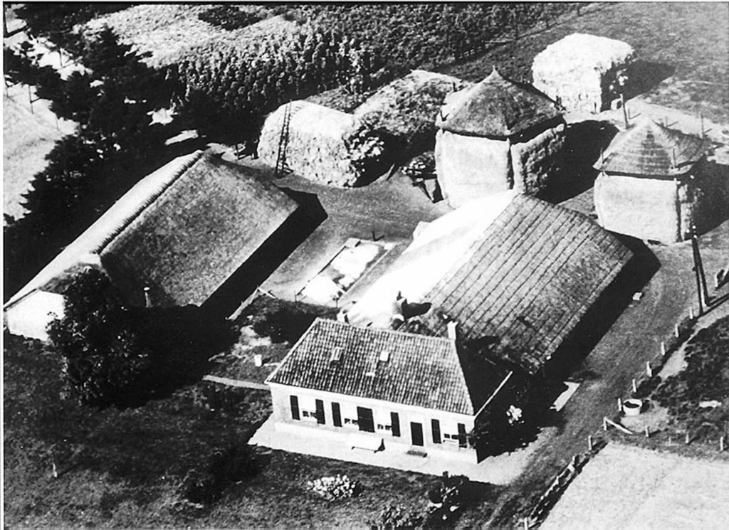 Ferme où s'arrêta Léo Major avant d'aller libérer la ville de Zwolle.